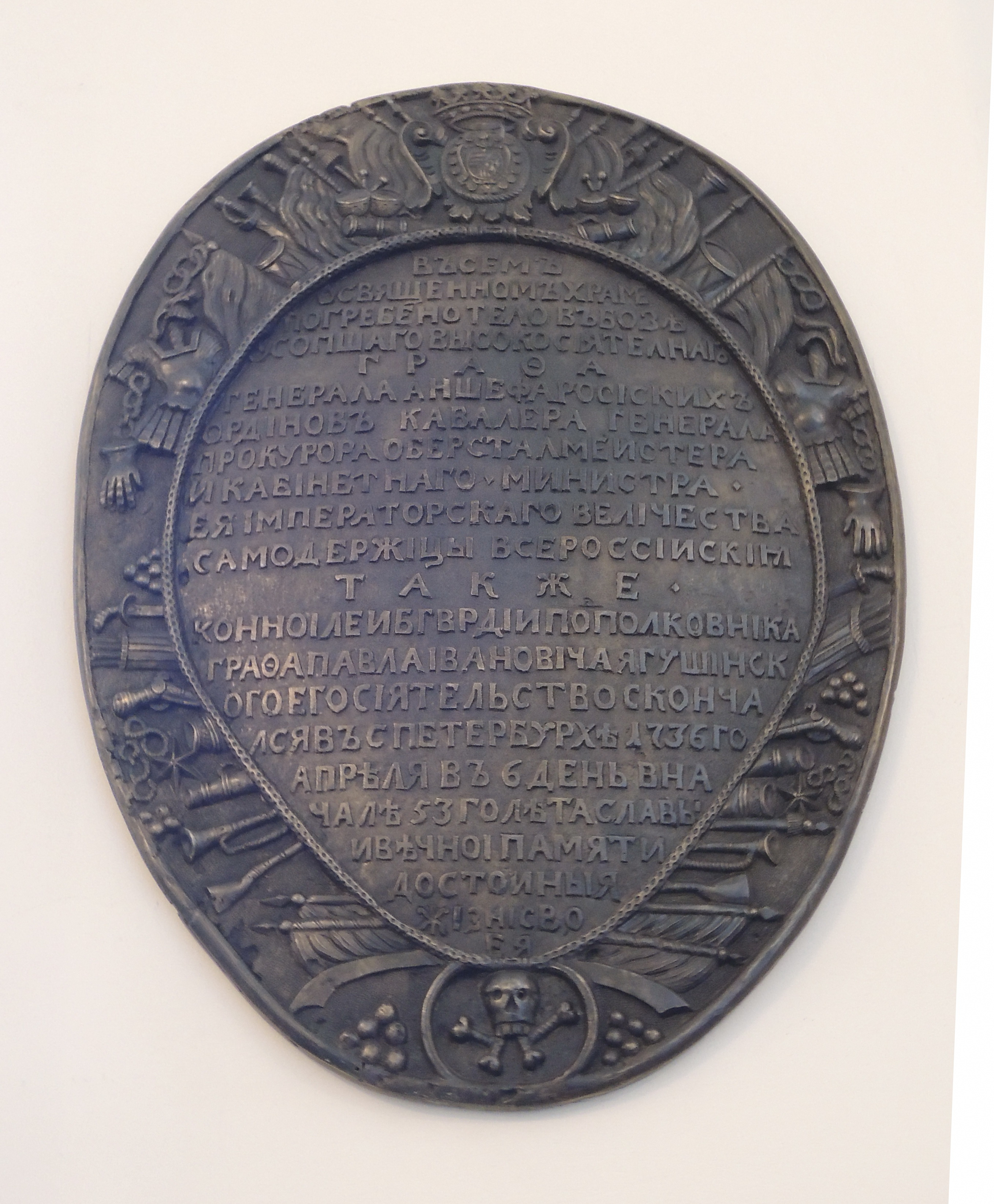 Благовещенская церковь Александро-Невской лавры. Ягужинский, Павел Иванович (1683—1736). Медная доска с эпитафией. Помещена у места захоронения «при левом крылосе» Благовещенской церкви.